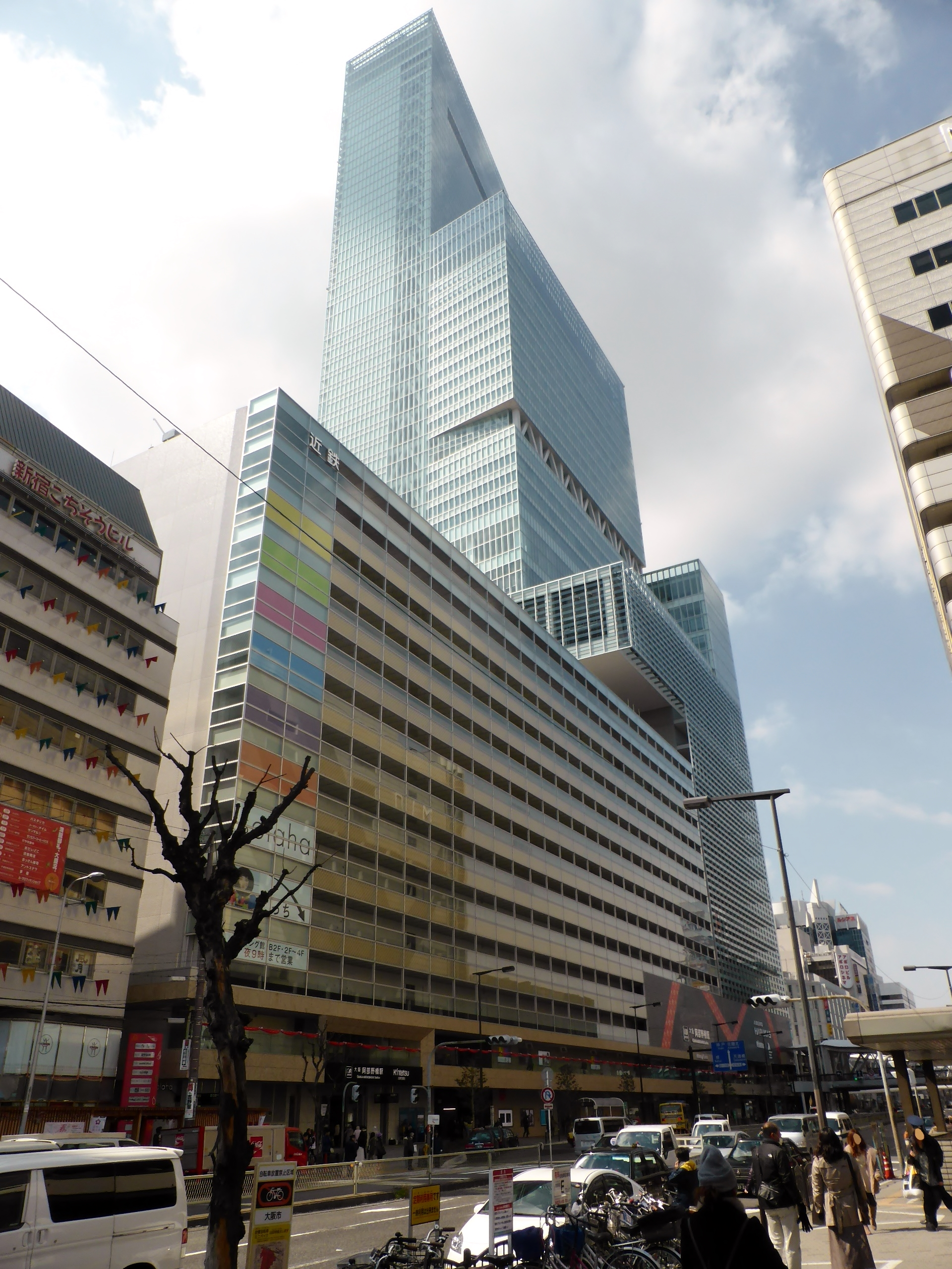 2014年3月7日のあべのハルカスを撮影。